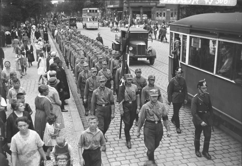 1932 Berlin SA-Propagandamarsch in Spandau